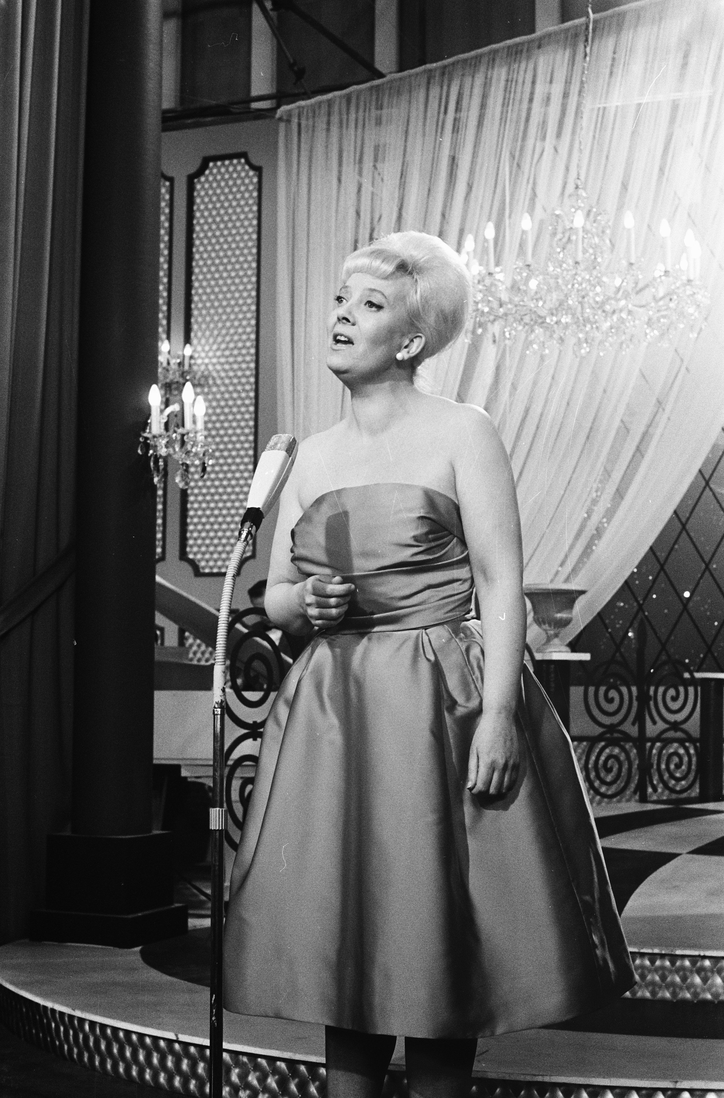 Collectie / Archief : Fotocollectie Anefo Reportage / Serie : [ onbekend ] Beschrijving : Eurovisie Songfestival 1962 te Luxemburg, voor Noorwegen Inger Jacobsen Datum : 18 maart 1962 Locatie : Luxemburg, Noorwegen Trefwoorden : artiesten, songfestivals Persoonsnaam : Jacobsen Inger Fotograaf : Pot, Harry / Anefo Auteursrechthebbende : Nationaal Archief Materiaalsoort : Negatief (zwart/wit) Nummer archiefinventaris : bekijk toegang 2.24.01.05 Bestanddeelnummer : 913-6613